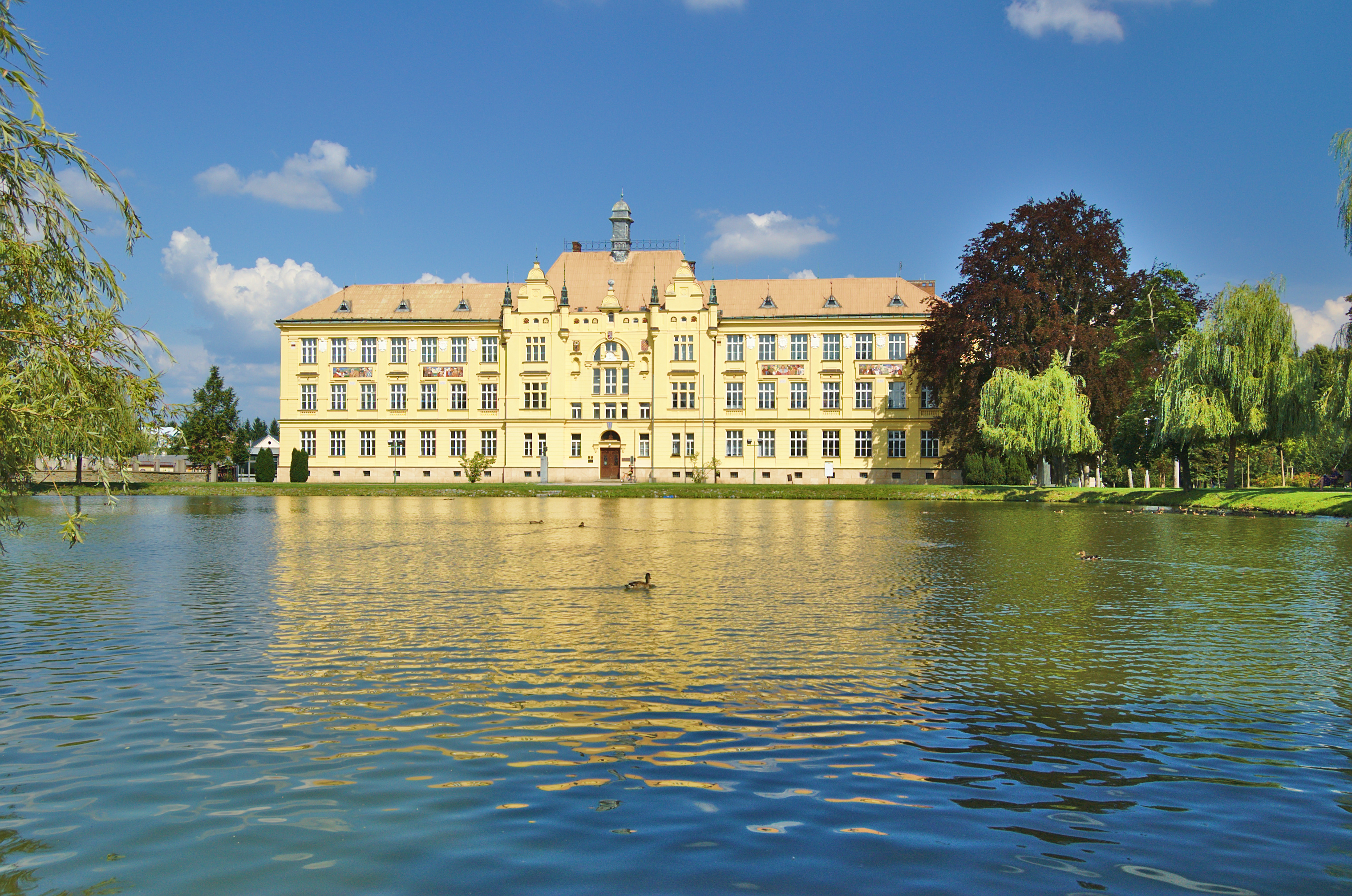 Gymnázium Jana Opletala, Litovel, okres Olomouc